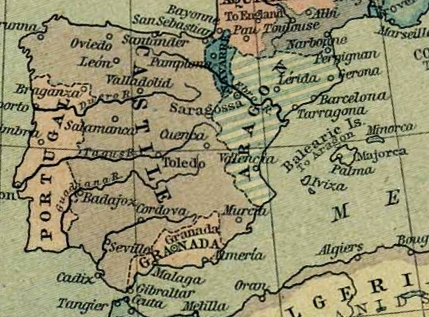 La península ibérica en 1360.